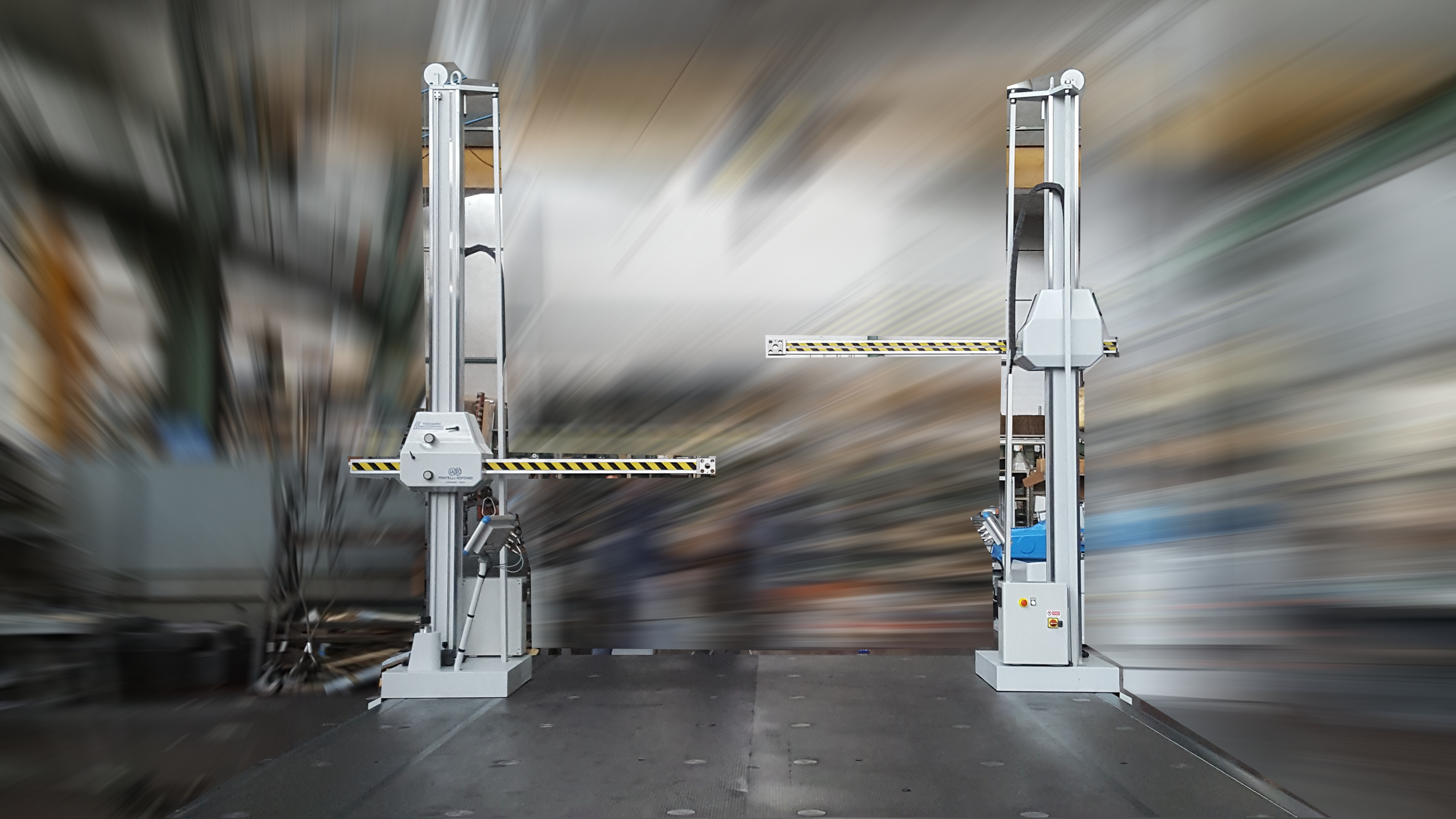 Macchina di tracciatura tridimensionale composto da un sistema di due truschini su piano in ghisa.